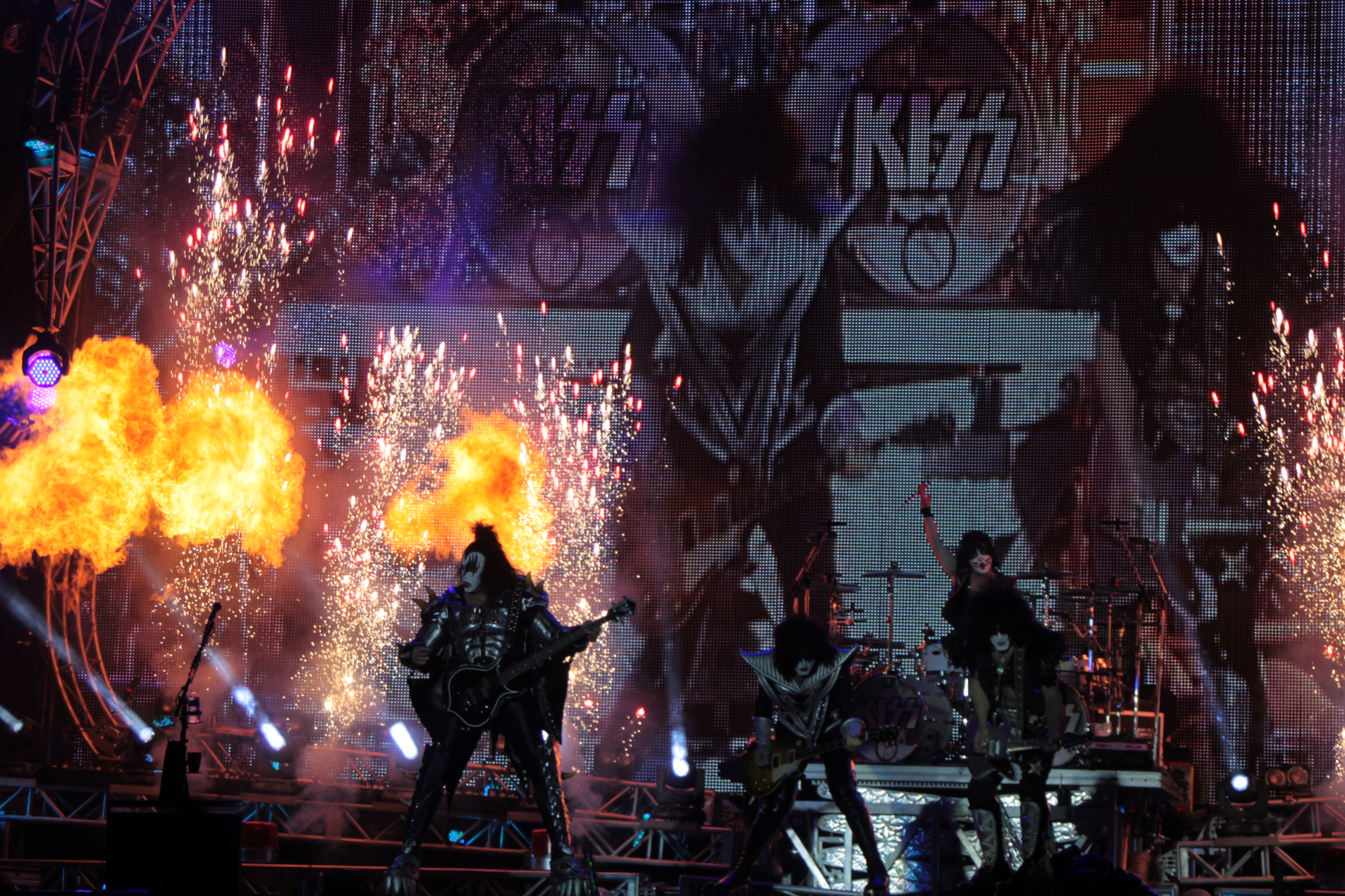 Kiss, Helfest 2013, Fr-44-Clisson.